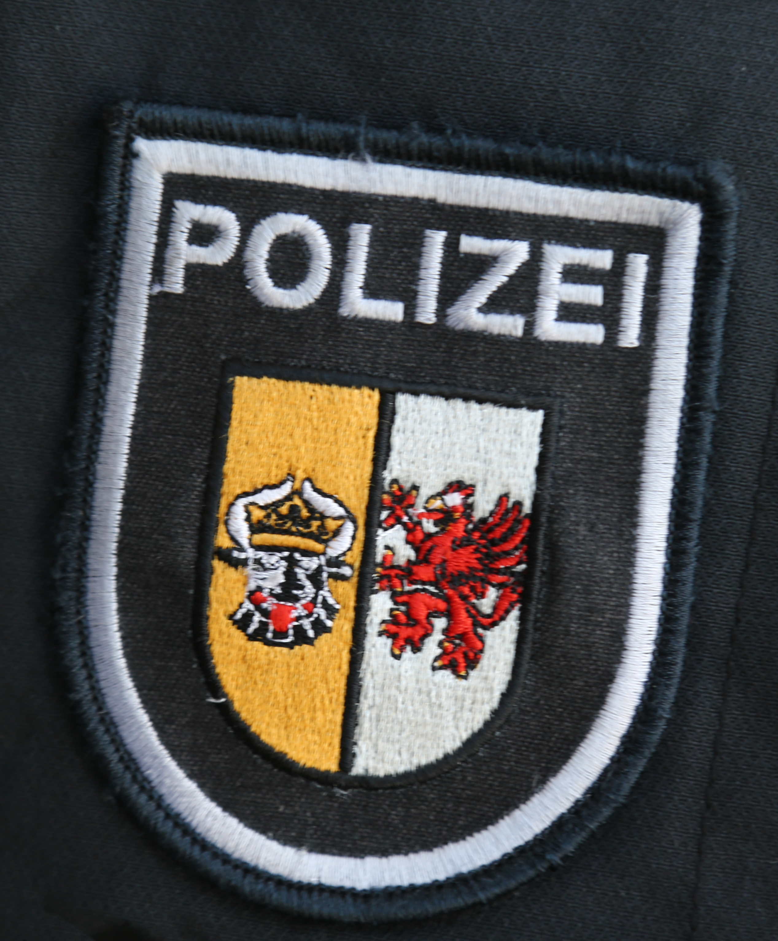 Ärmelwappen der Polizei Mecklenburg-Vorpommern